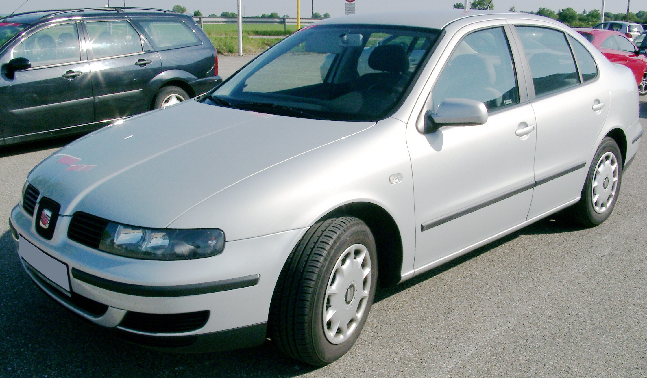 Seat Toledo, 2. Generation